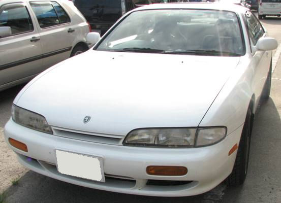 Nissan Silvia(S14)